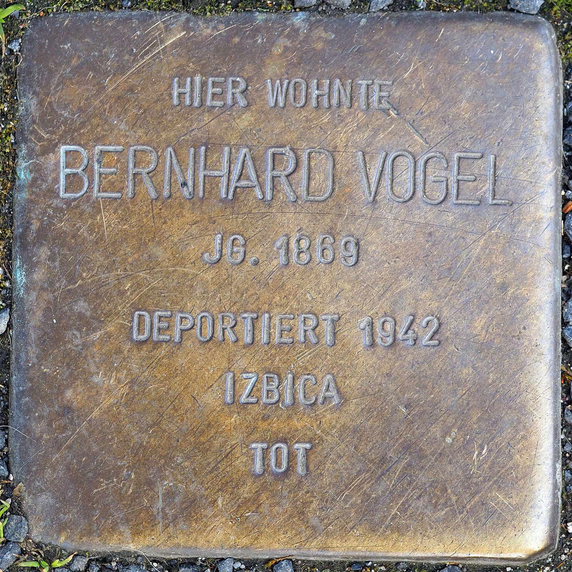 Stolpersteine MG: Vogel, Bernhard